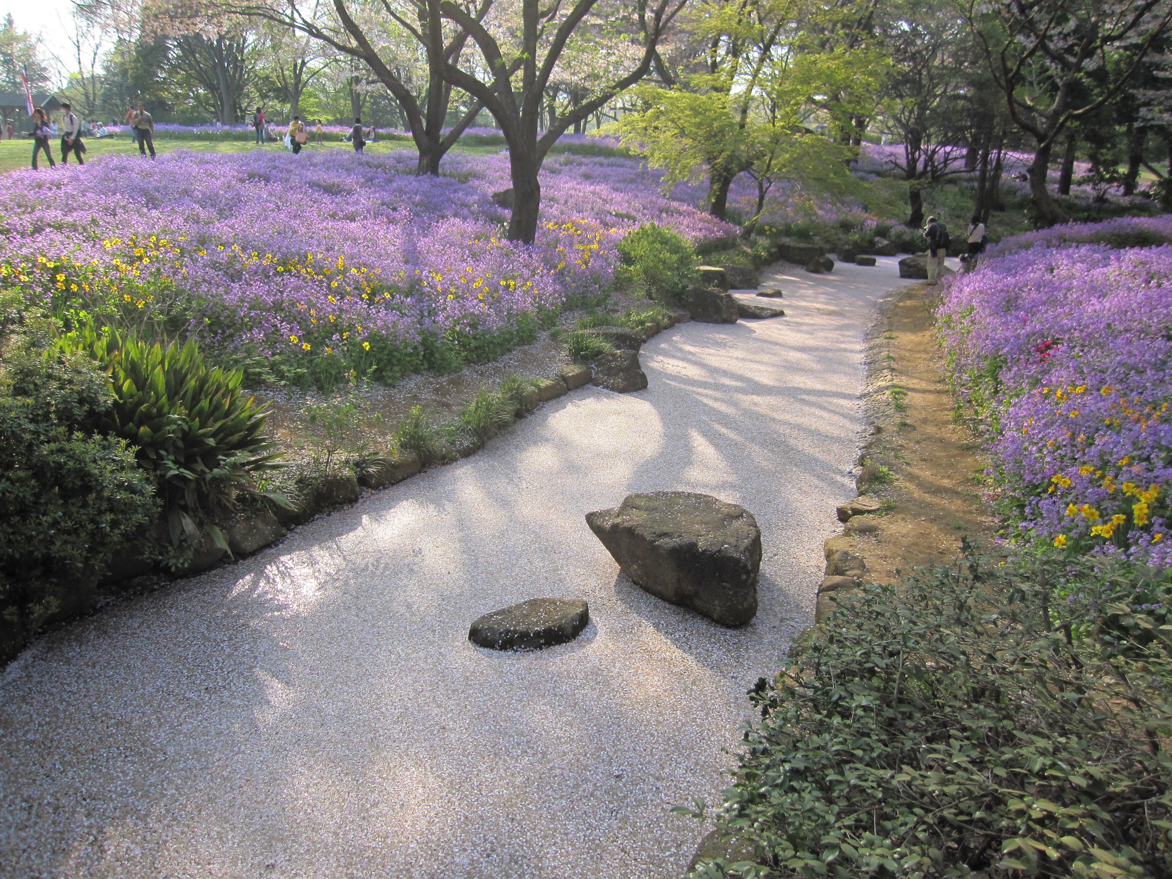 川を埋め尽くす桜の花びら